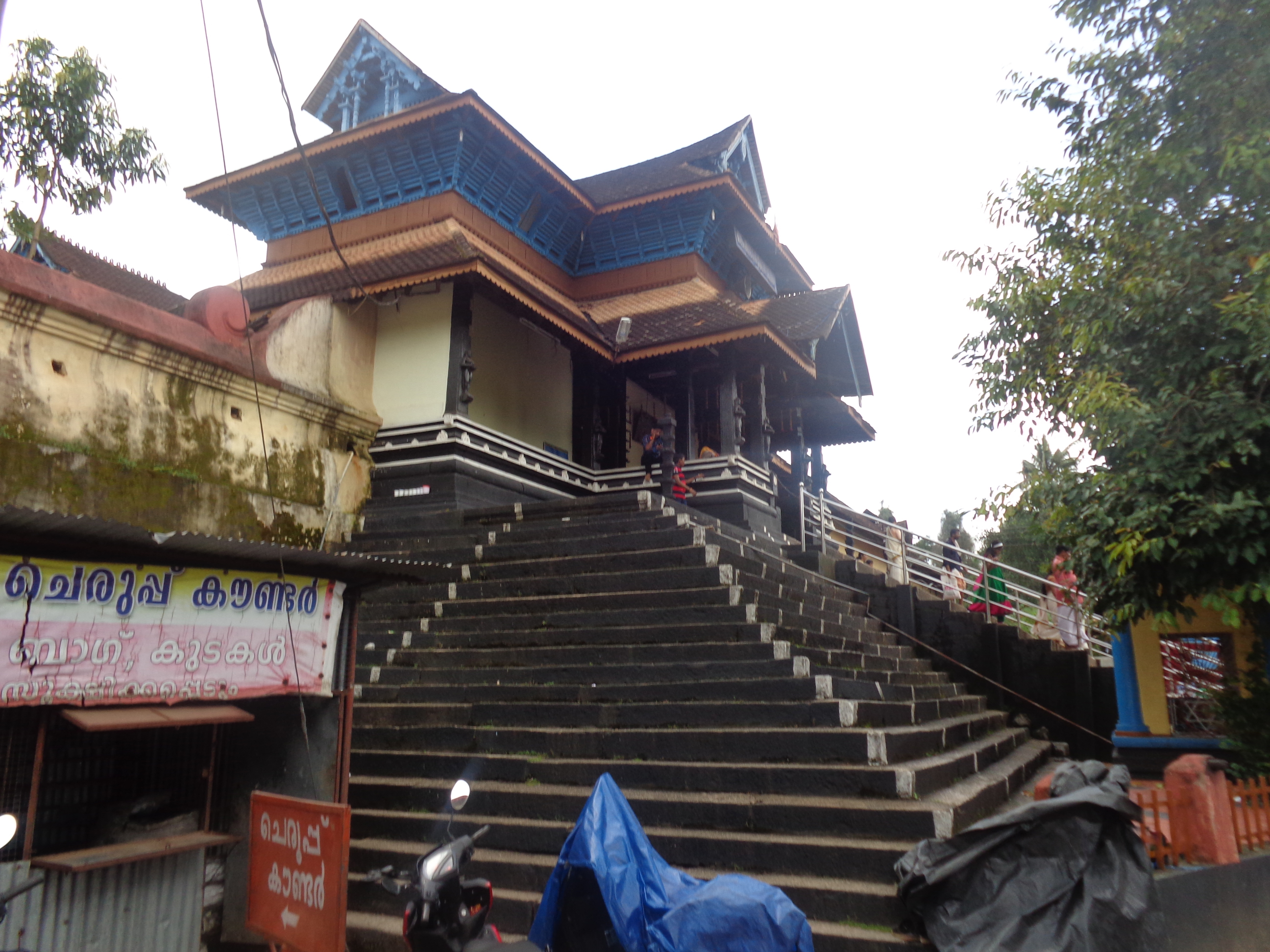 the gopuram or aranmula parthasarathi temple